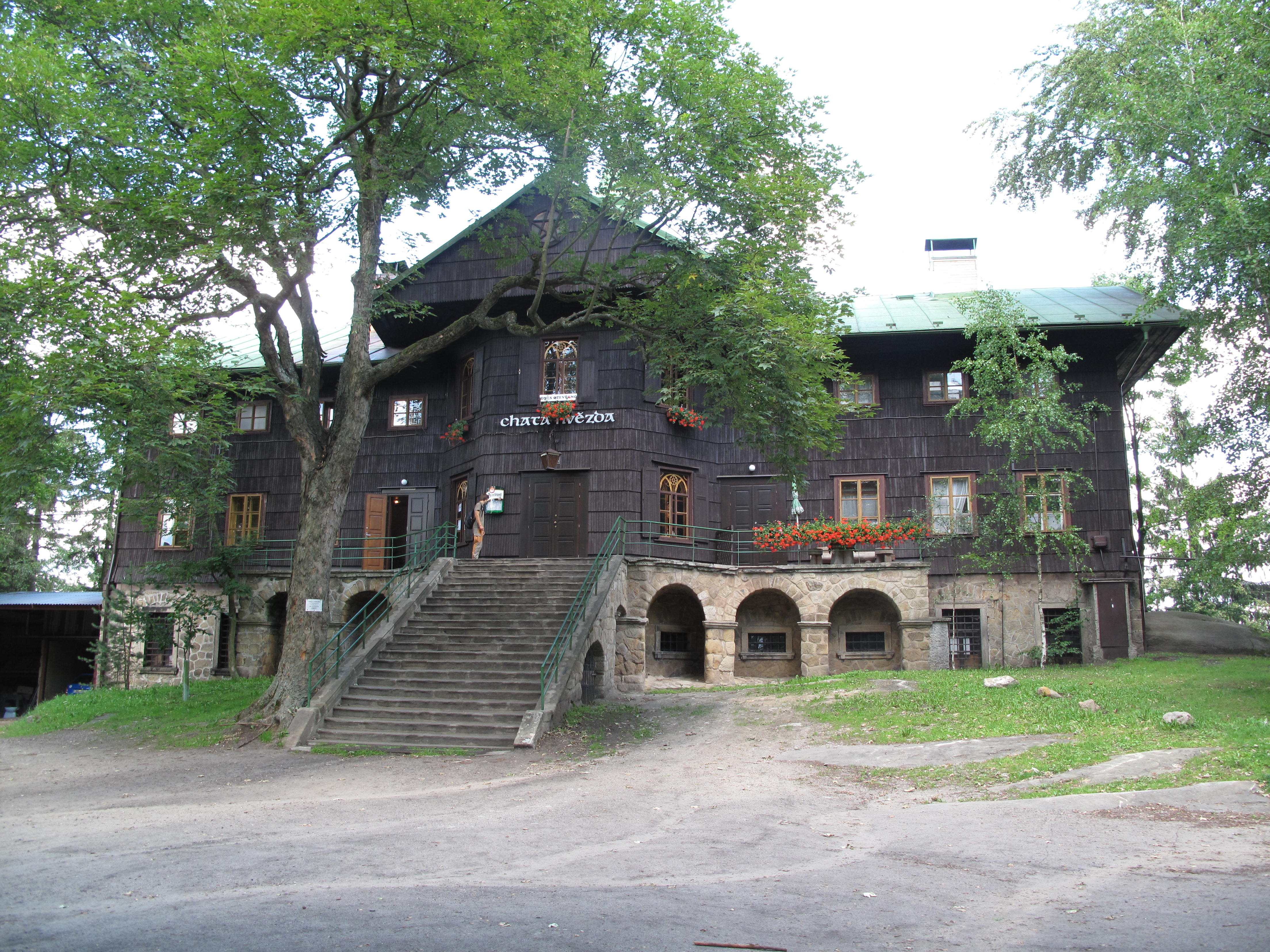 Chata Hvězda